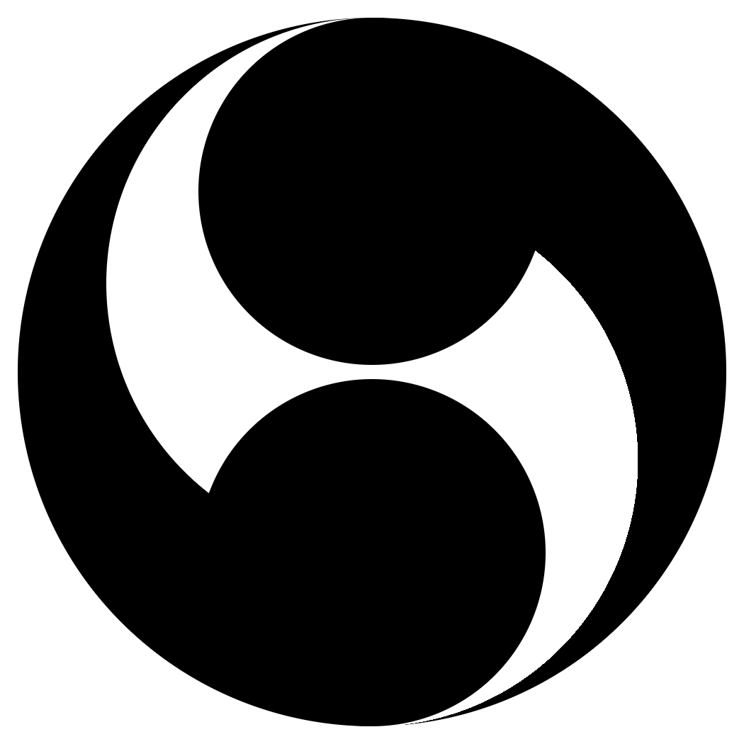 二つ巴